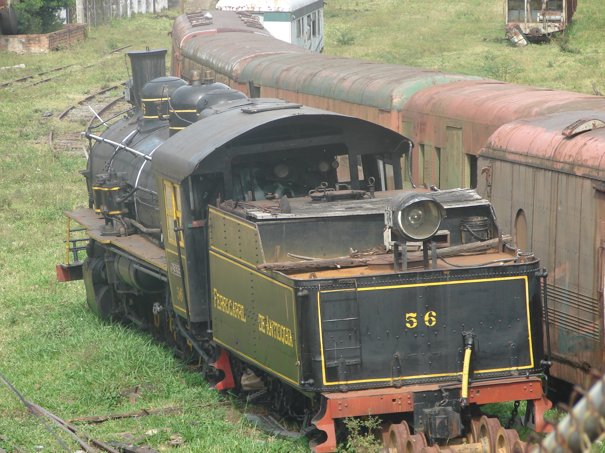 Antiguo Tren, en las antiguas instalaciones del ferrocarril en el Municipio de Bello. Colombia.